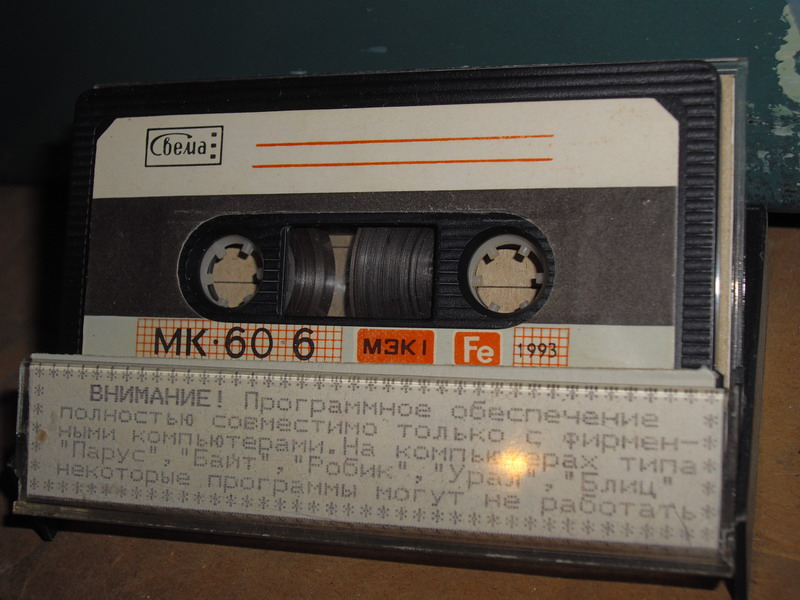 Кассета магнитофонная. "Свема" МК-60-6. 1993 год изготовления Compact audio cassette